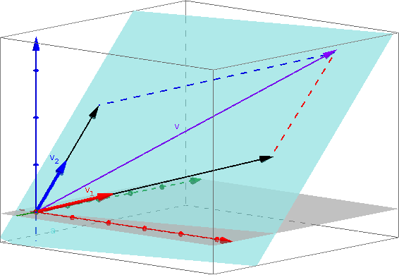 Tres vectores en un mismo plano. Uno de ellos es combinación lineal de los otros dos.